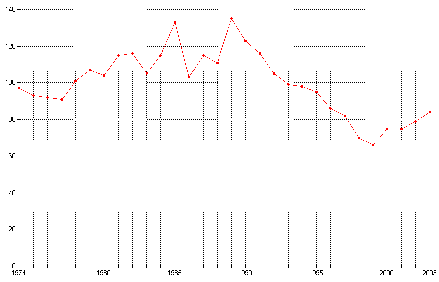 Levande födda i Vilhelmina kommun 1974-2003.